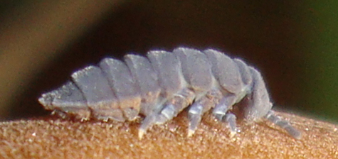 Larvěnka obrovská(Tetrodontophora bielanensis) Podkomorské lesy, Česká republika, jižní Morava